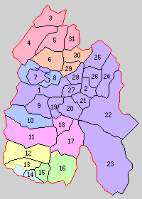 長野県上伊那郡の町村。